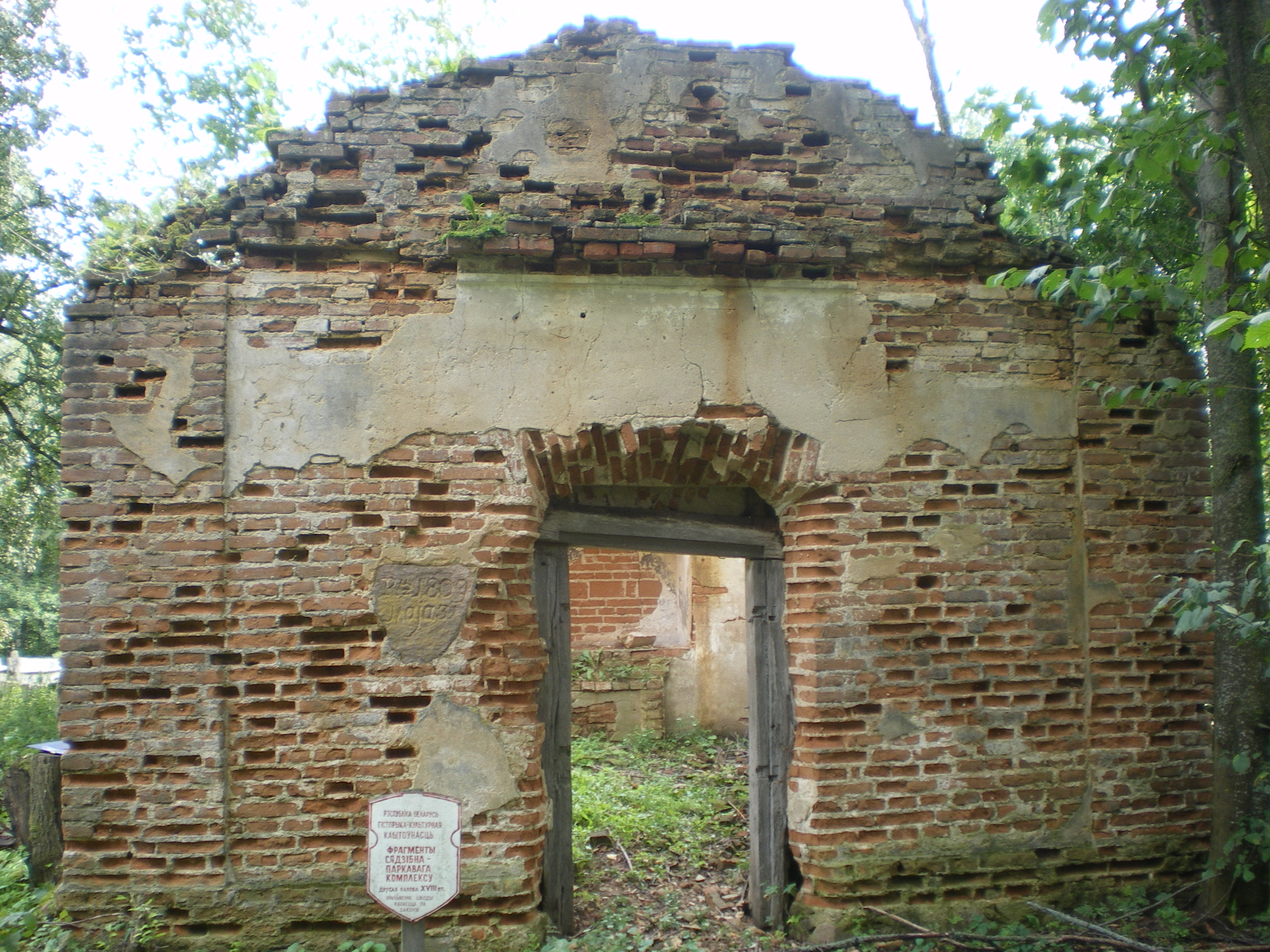 фрагмент усадьбы "Голынка" построенной во второй половине XVIII века, Клецкий район Минской области